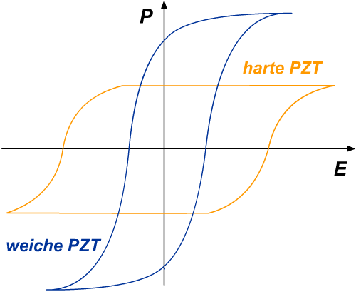 Hysteresekurve von Blei-Zirkonat-Titanaten (PZTen)